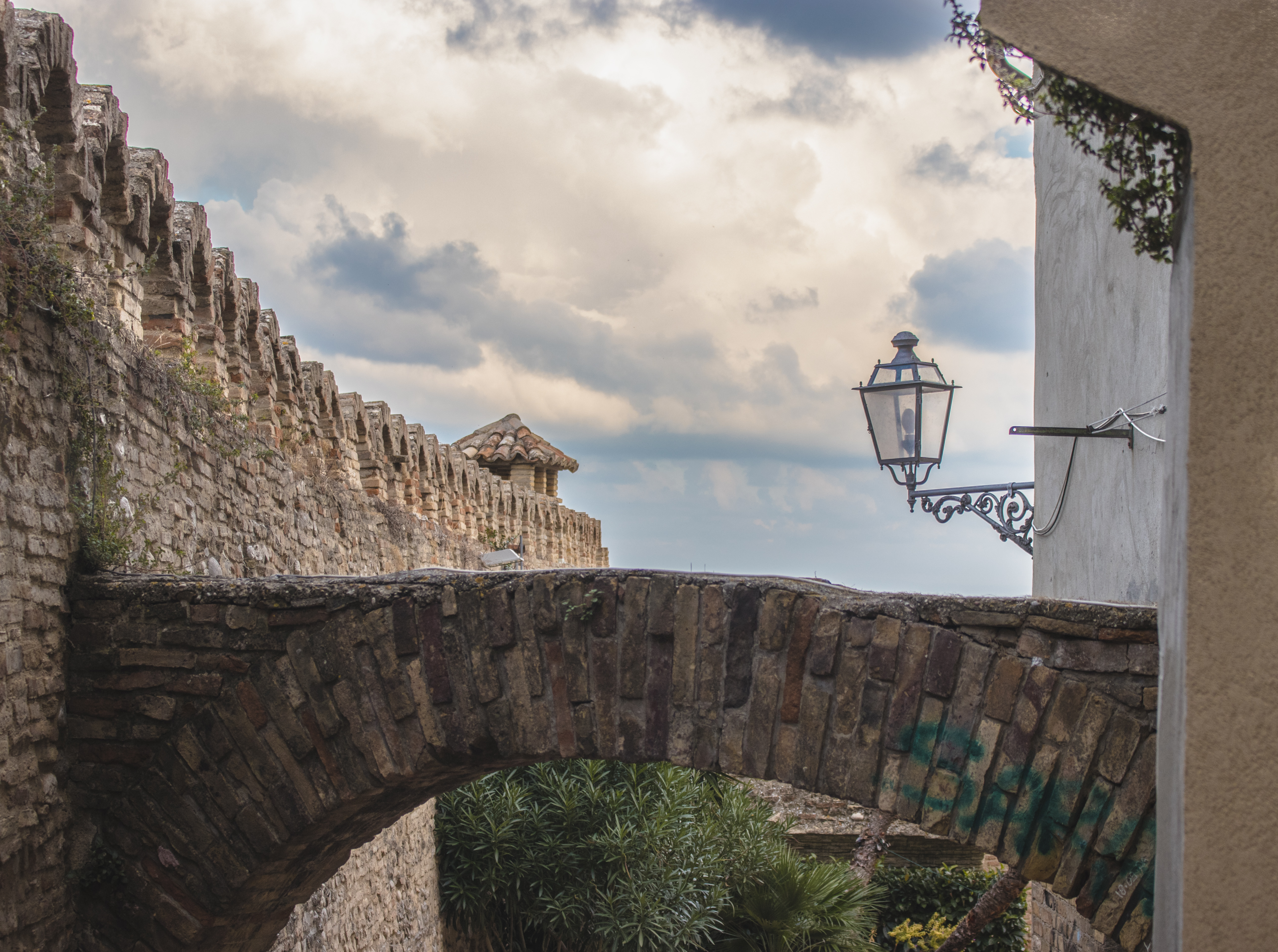 Arco e muro del lato esterno del Giardino Napoletano situato presso il Palazzo D'Avalos di Vasto. This is a photo of a monument which is part of cultural heritage of Italy.